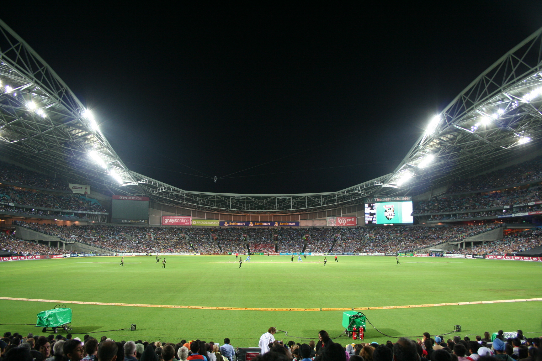 ANZ Stadium